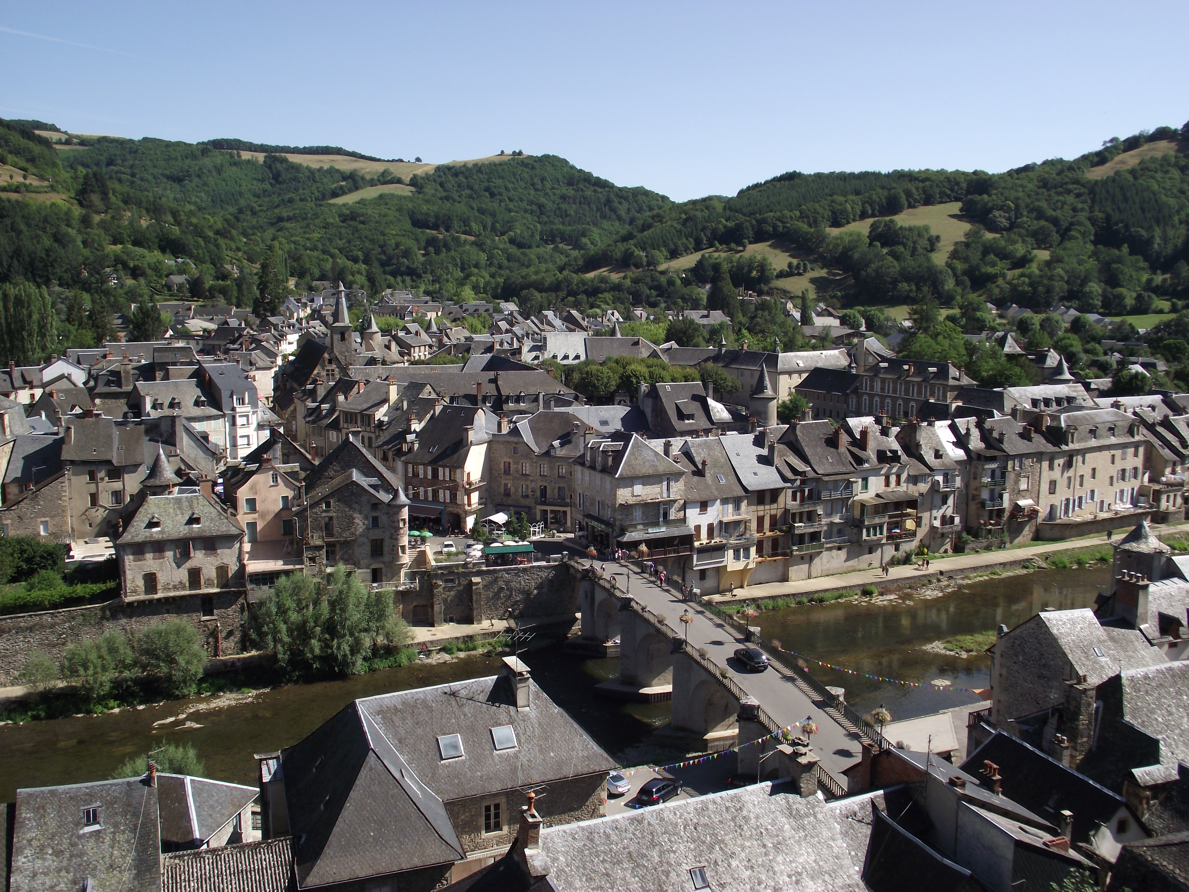 Saint Geniez d'Olt (Aveyron)